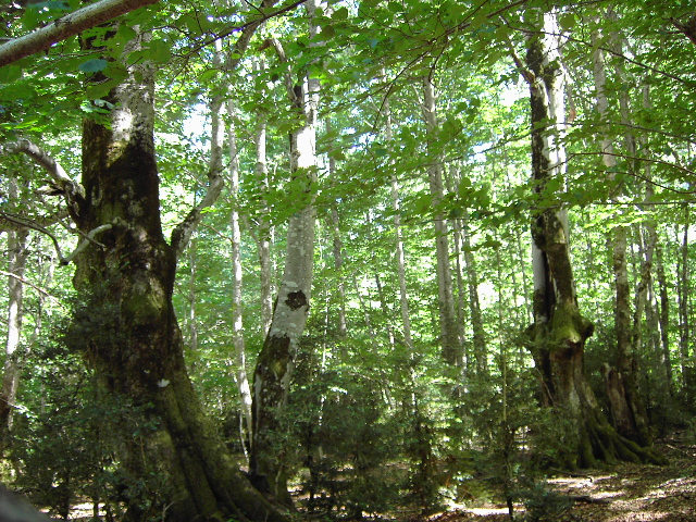 Bosques de hayas alimentados por las nieblas en la Valle de Pineta, Huesca.